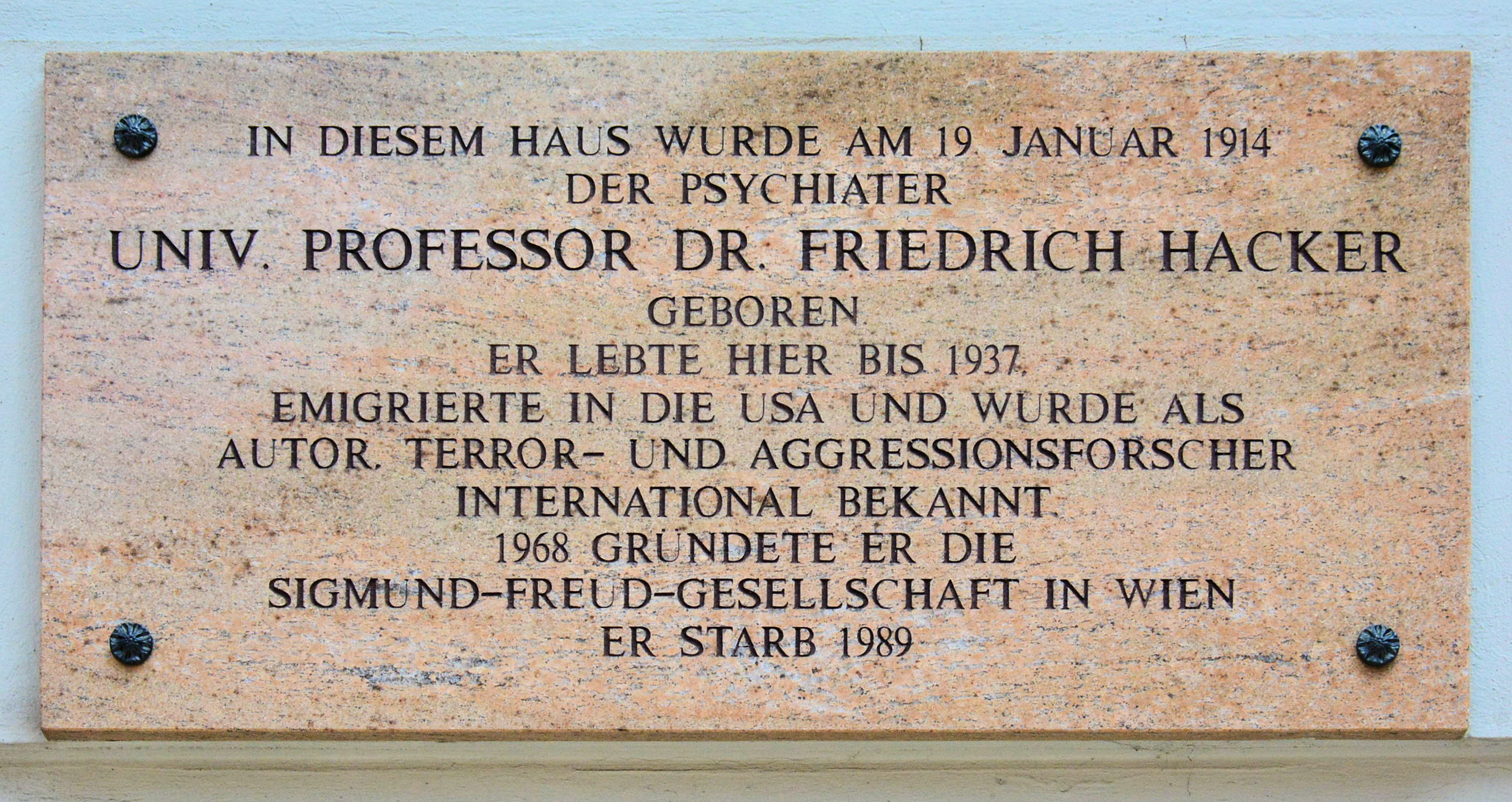 Gedenktafel für Friedrich Hacker (Wien, Hegelgasse 21)